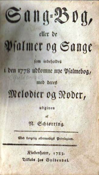 Guldbergs salmebok fra 1783